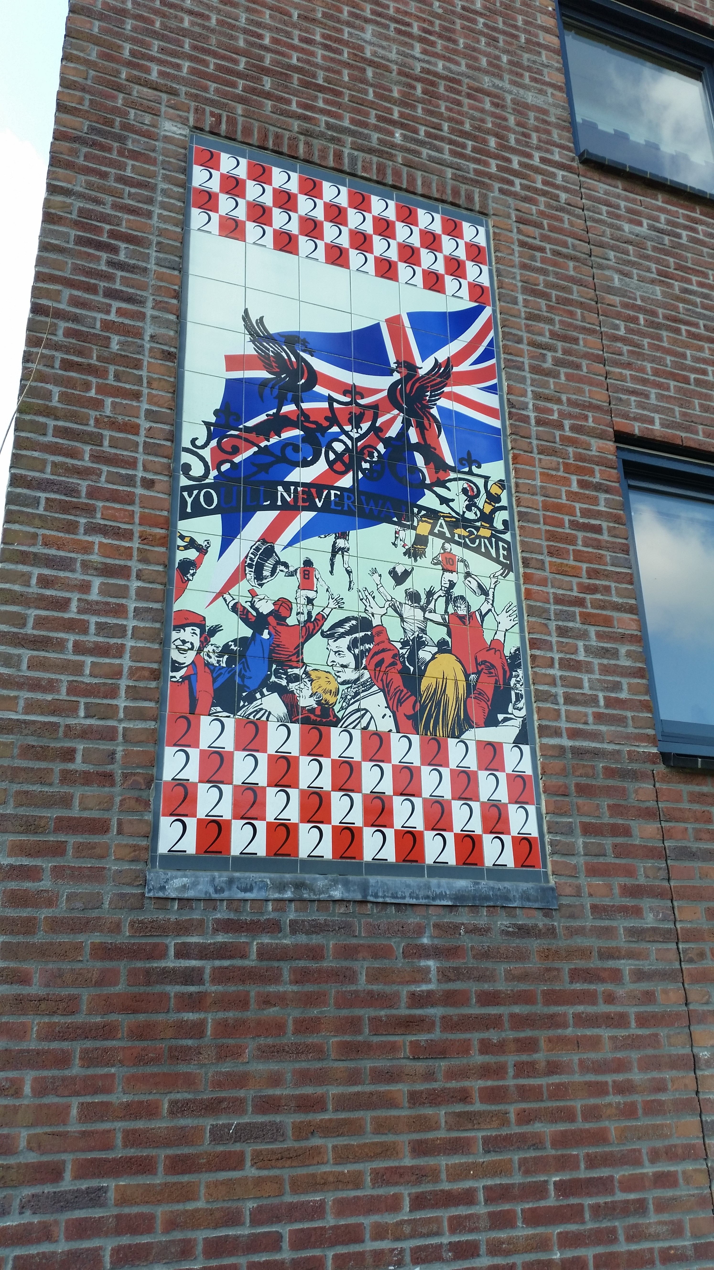 Tegeltableaus in Park de Meer, Watergraafsmeer, Amsterdam-Oost